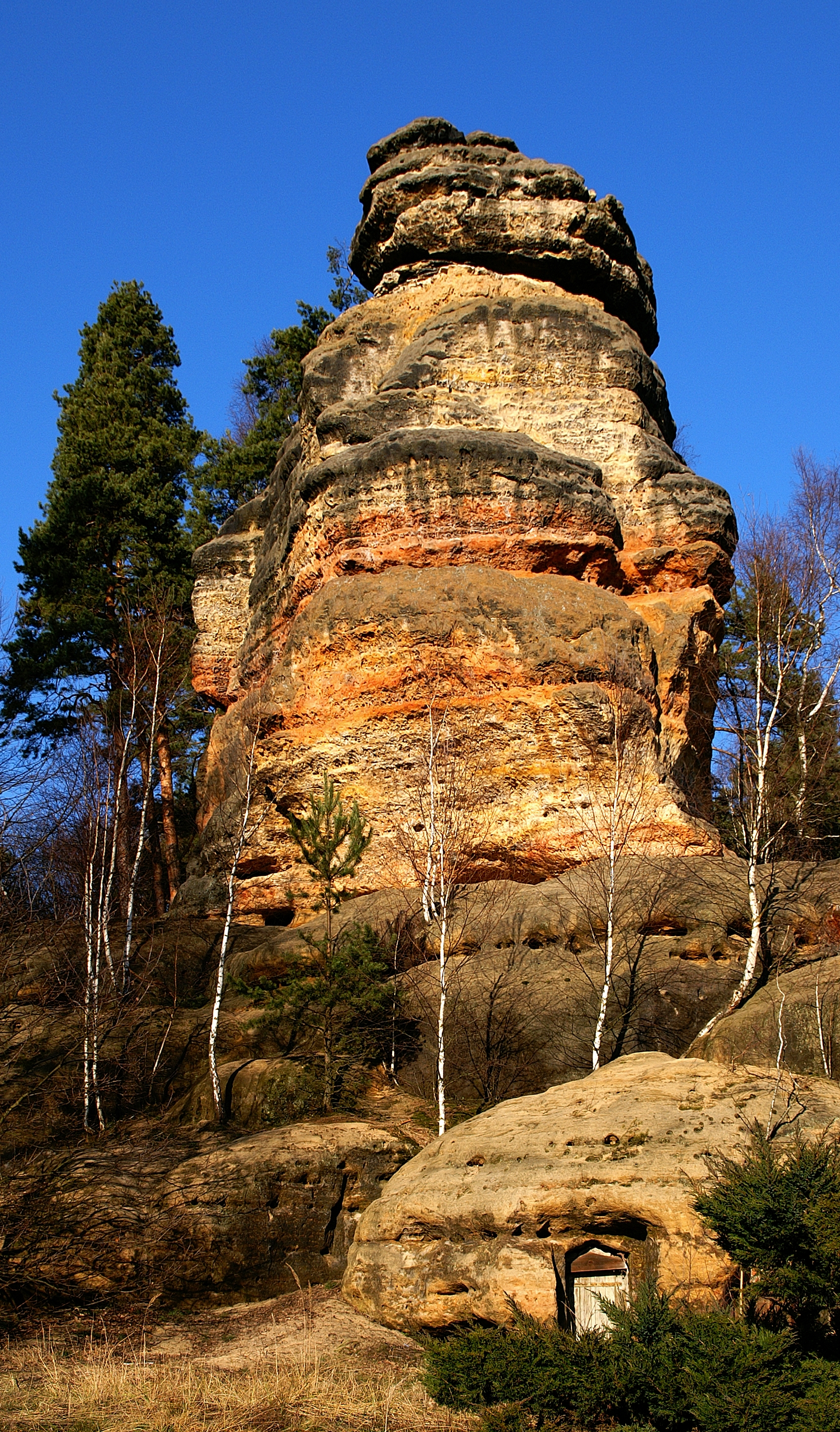 Vranovské skály ve Vranově u Mimoně (na snímku je skála Džbán).